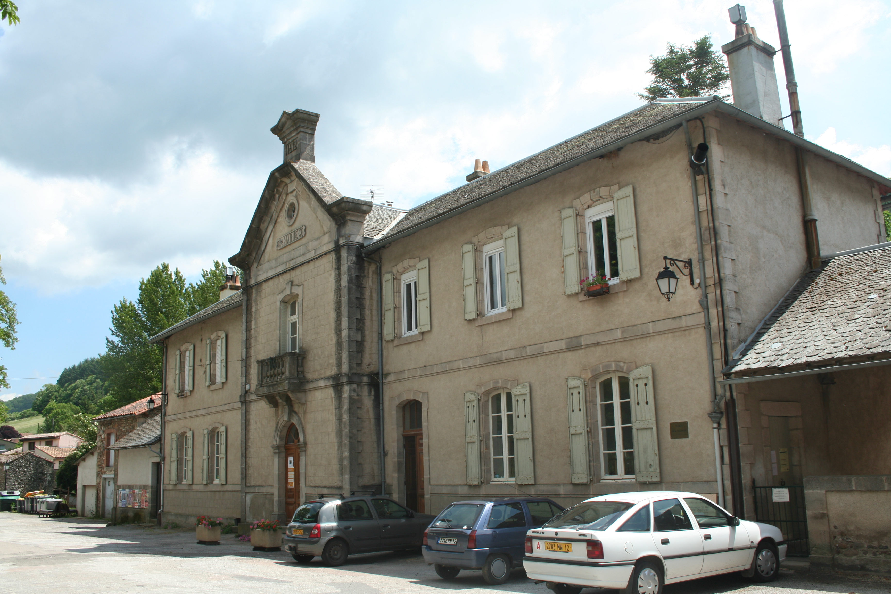 Fayet (Aveyron) - mairie.